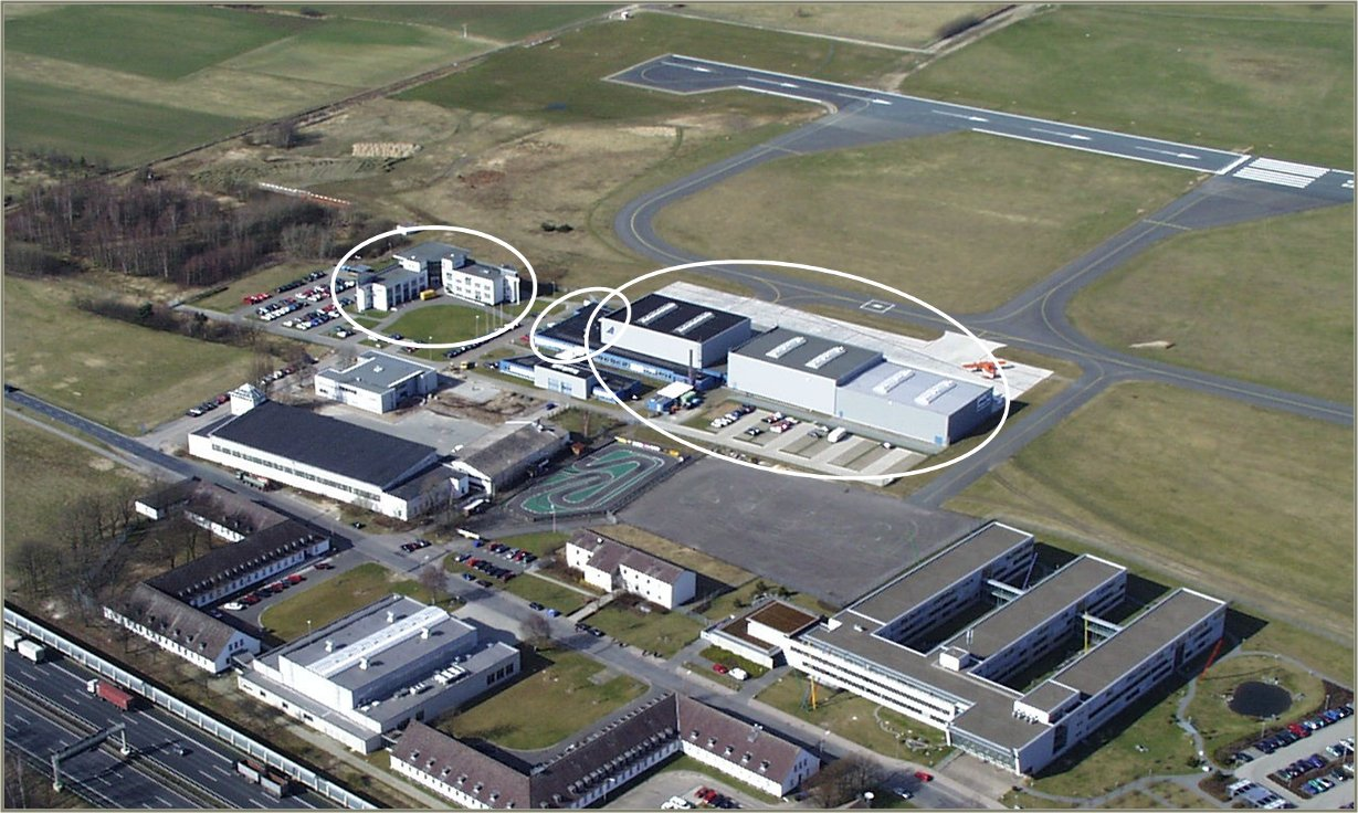 Aerodata AG Firmengelände aus der Luft